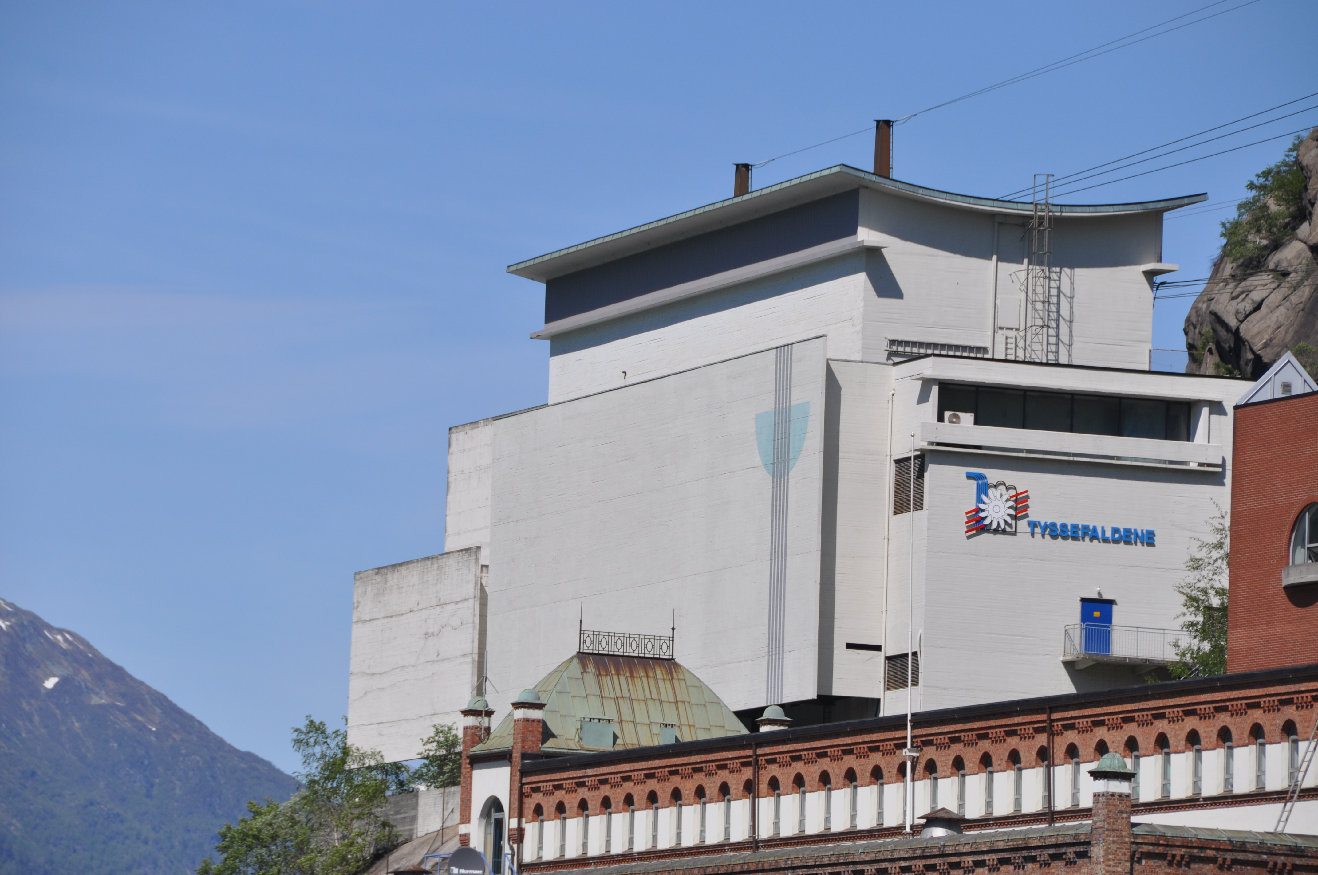 Image Note: Sengjanes transformer station is part of a long history of energy and industry in Tyssedal. The station, put into operation in 1967, is an example of how even a post-war transformer station may have extravagant architecture. It is also a good example of regional power supply. Bildenotat: Sengjanes transformatorstasjon er del av en lang energi- og industrihistorie i Tyssedal. Stasjonen, satt i drift i 1967, er et eksempel på at også etterkrigstidens transformatorstasjoner kan ha påkostet arkitektur. Den er også et godt eksempel på regional strømforsyning. Date/Dato: 01.06.2010 Photographer/Fotograf: Sissel Riibe Feel free to use the photos, but please make sure you attribute the photographer and mention NVE as the source. Bruk gjerne bildene, men vennligst oppgi fotografens navn og angi NVE som kilde. Format: Digital Archive/Arkiv: Image ID/Bilde ID